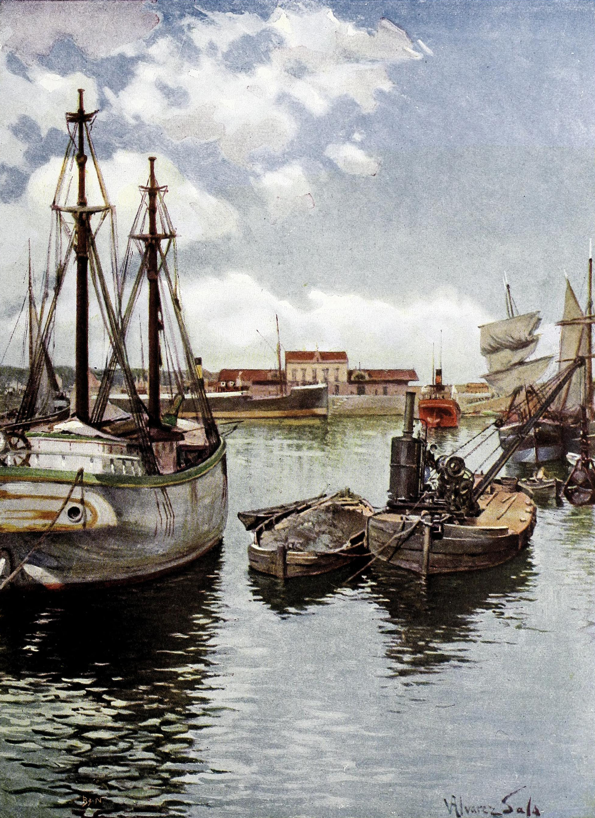 El puerto de Gijón.